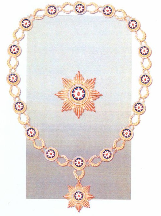 Azərbaycan Prezidentinin döş nişanı